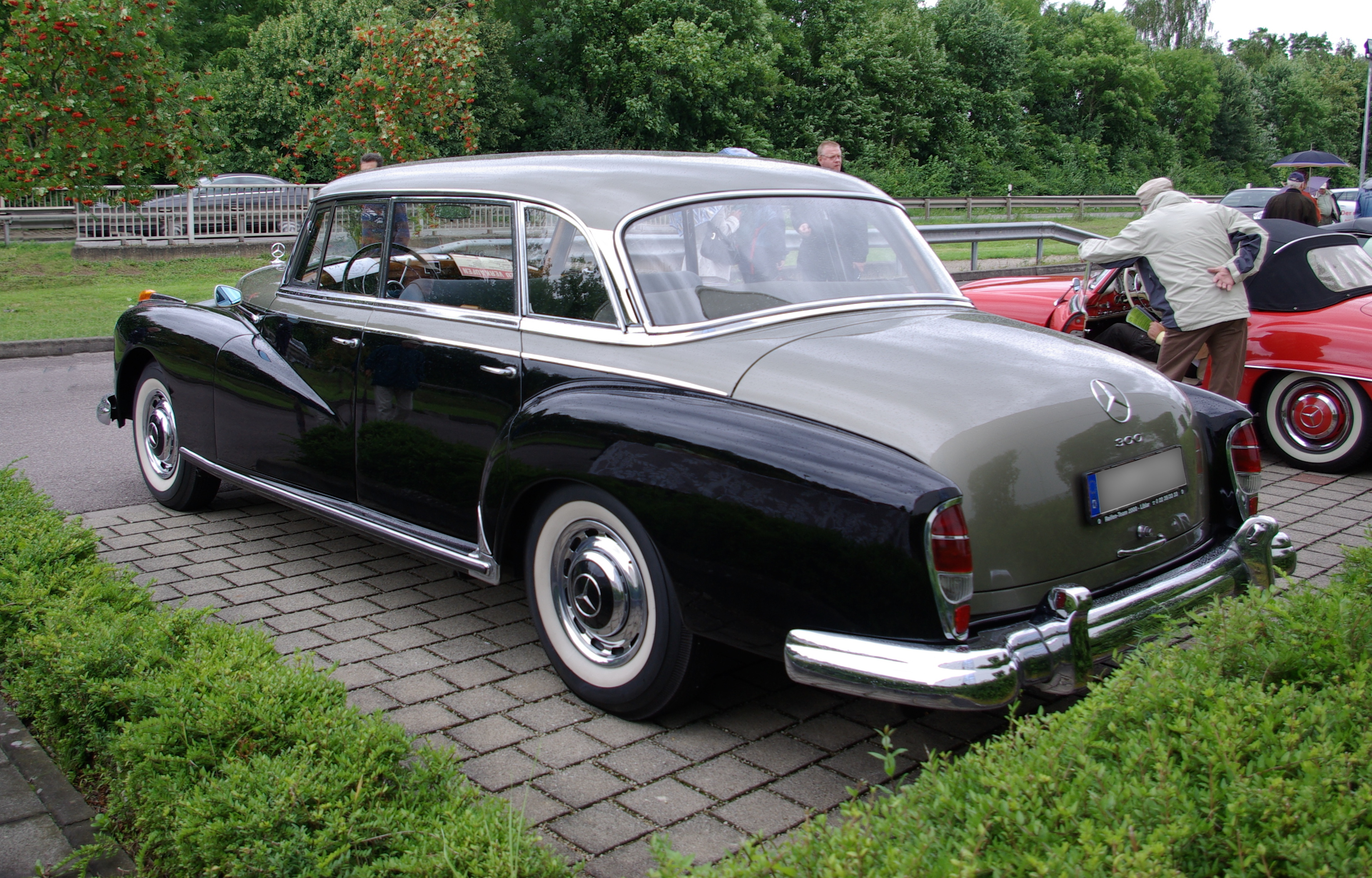 Mercedes Benz 300d, W189, Baujahr 1959 aufgenommen bei / photographed at "25. Internationales Konzer Oldtimer-Treffen", 19. Juli 2009